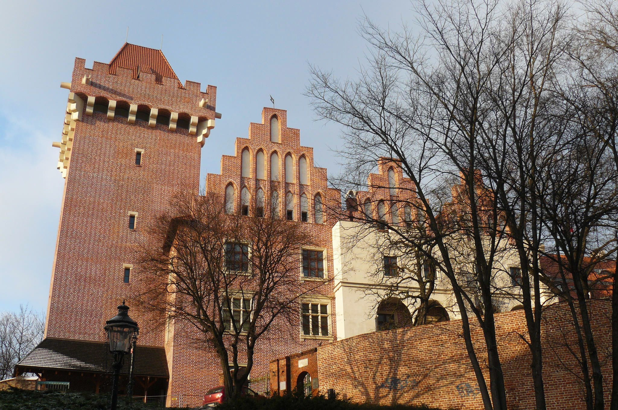 Zamek Królewski w Poznaniu - stan na koniec 2014r.